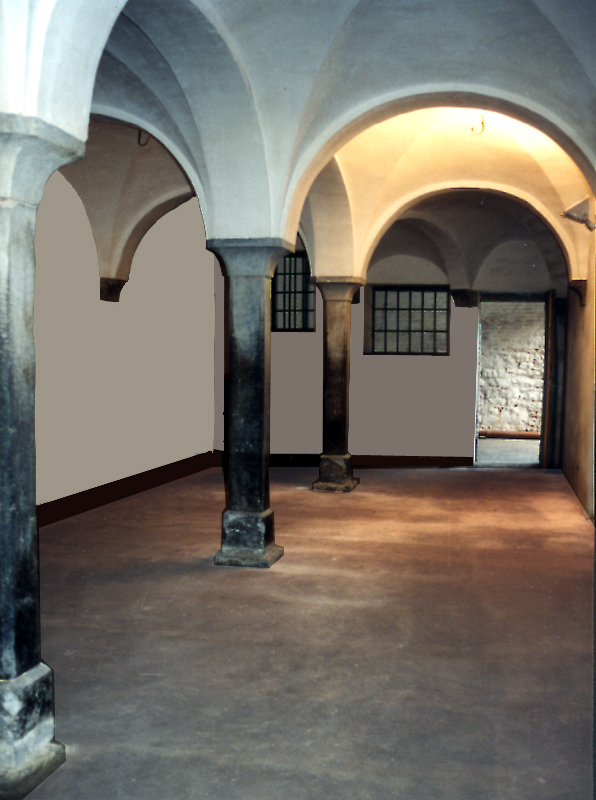 L'une des écuries du XVIIe siècle de la Ferme castrale de Hermalle-sous-Huy